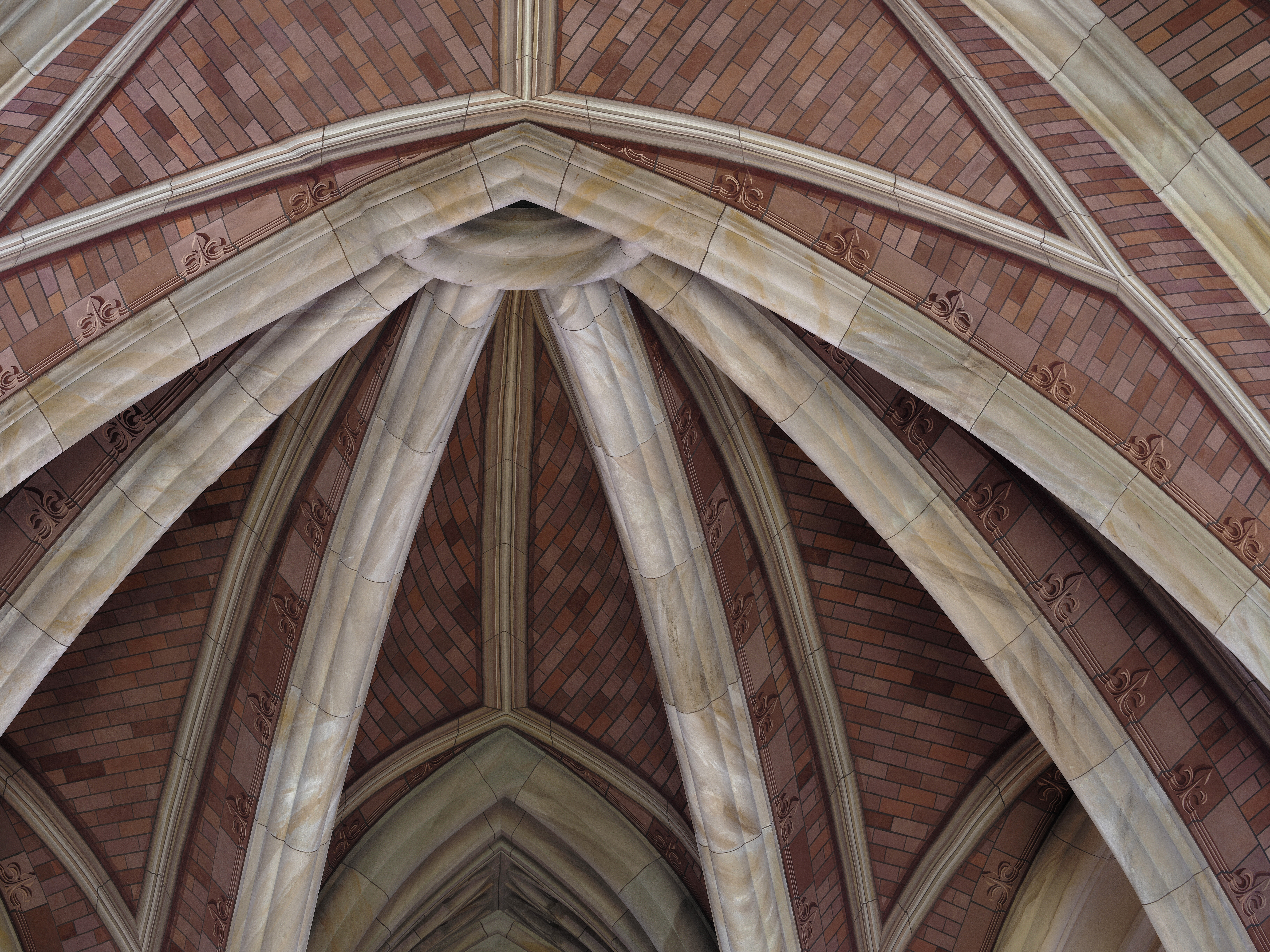 Berlin, Friedrichswerdersche Kirche am Tag der Wiedereröffnung nach Renovierung am 18. Januar 2020. Das Foto zeigt einen Teil der Gewölbeausmalung.